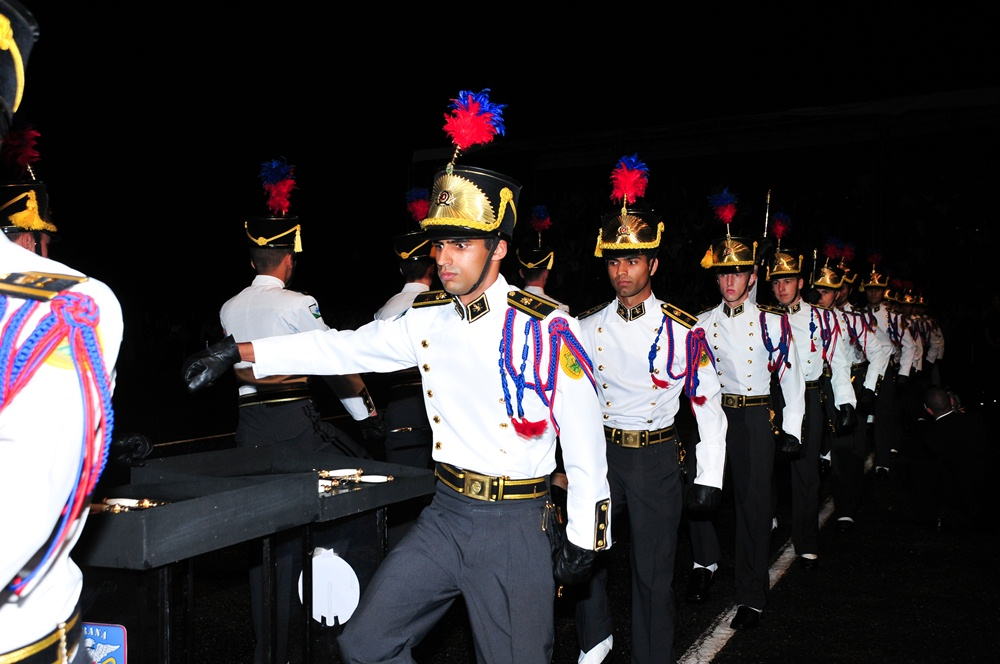 Cerimônia de entrega do Espadim de Tiradentes.